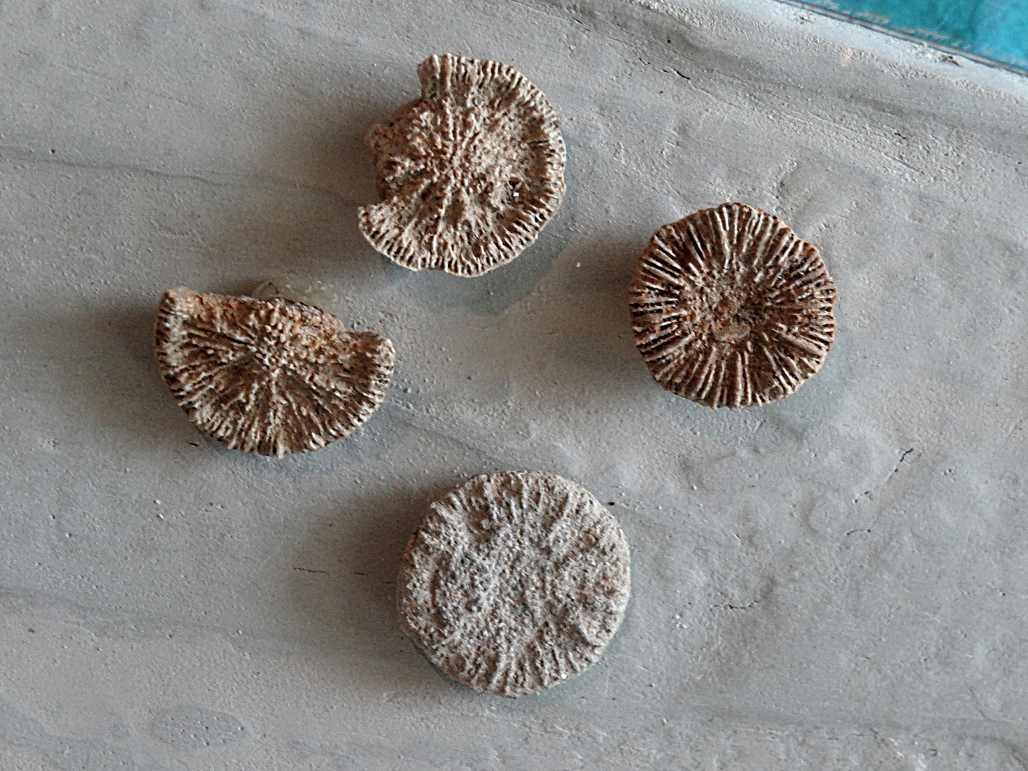 Scheibenkoralle Thecocyathus mitrae aus dem Schwarzen Jura der Fränkischen Alb; Fundort nahe Bad Staffelstein /Oberfranken; Exponat in der Petrefaktensammlung Kloster Banz